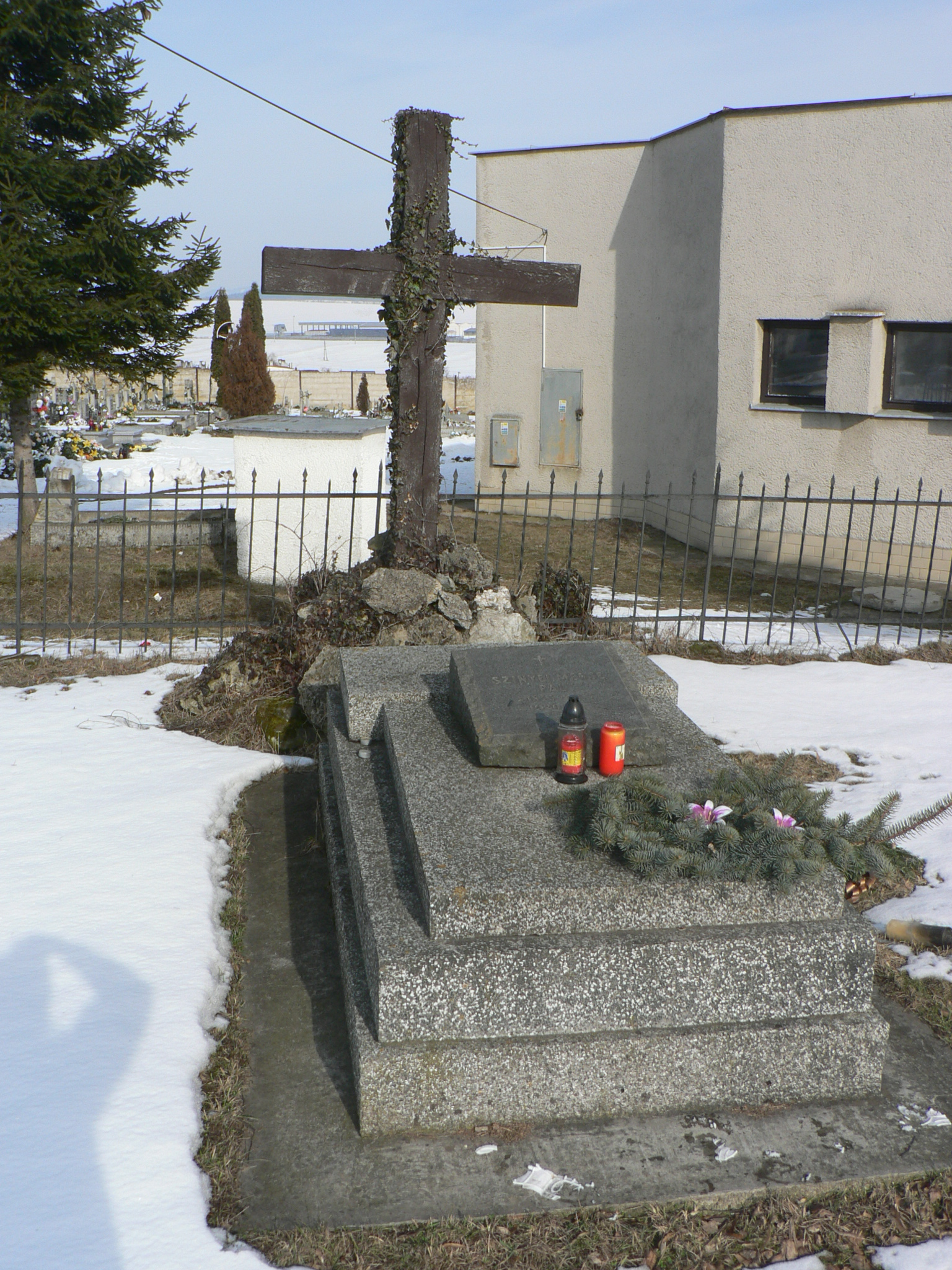 Szinyei Merse Pál sírja Jernyén (Szlovákia)